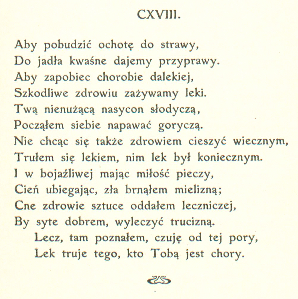 Sonety Shakespeare'a I-CXXXIV i CXXXVII-CLIV tłumaczenie Maria Sułkowska (MUS) sonet 118 strona 132